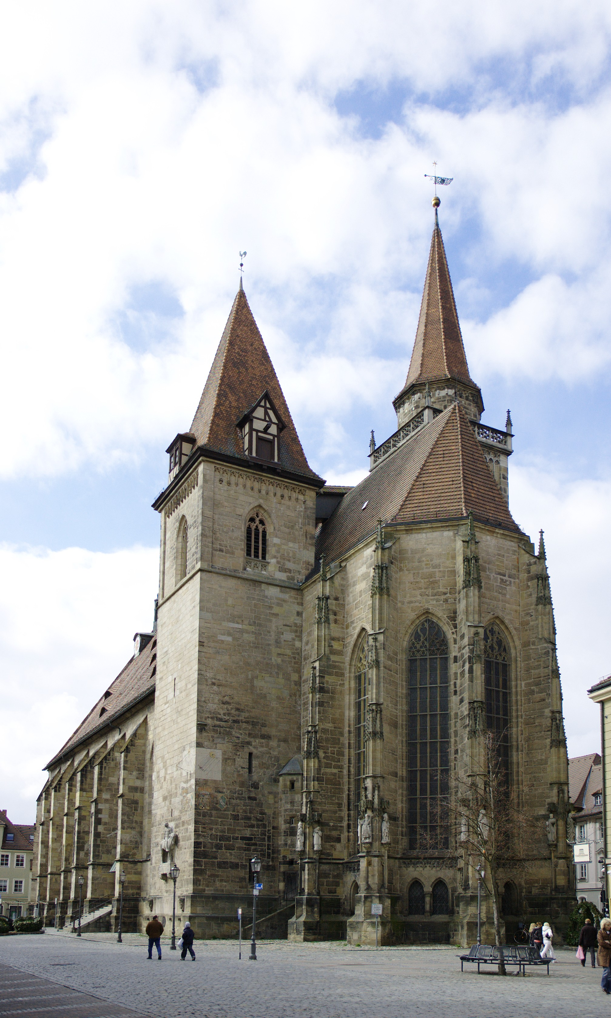 St. Johannis Ansbach